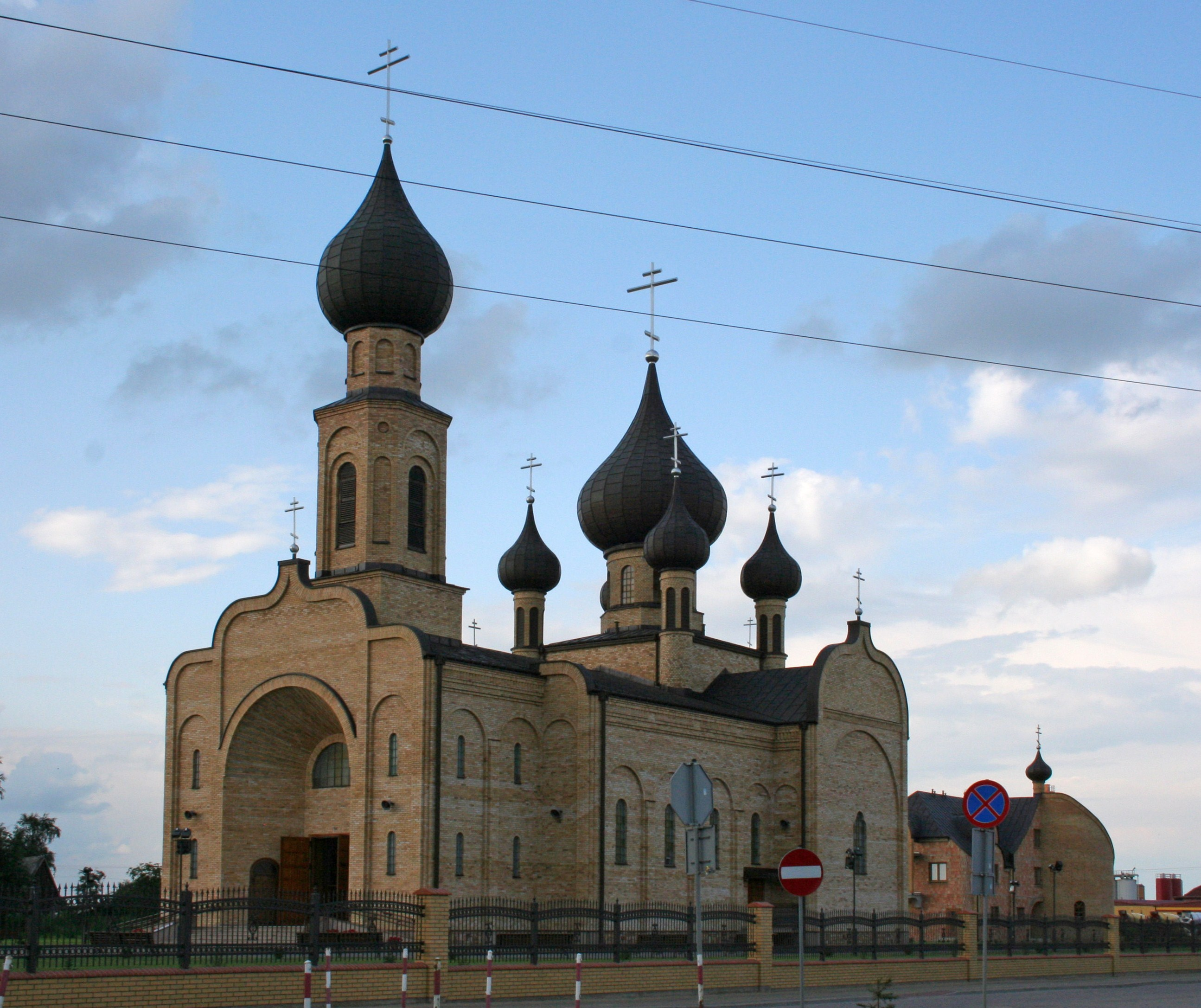 Cerkiew Zaśnięcia NMP w Bielsku Podlaskim.